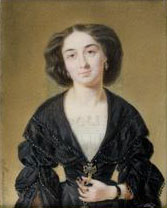 Беларуская (тарашкевіца): Марыя Тышкевіч (з Радзівілаў)